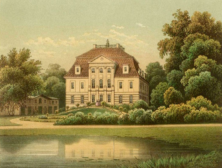 Schloss Nieder-Hirschfeldau (heute Jelenin, Polen) etwa zur Mitte des 19. Jahrhunderts